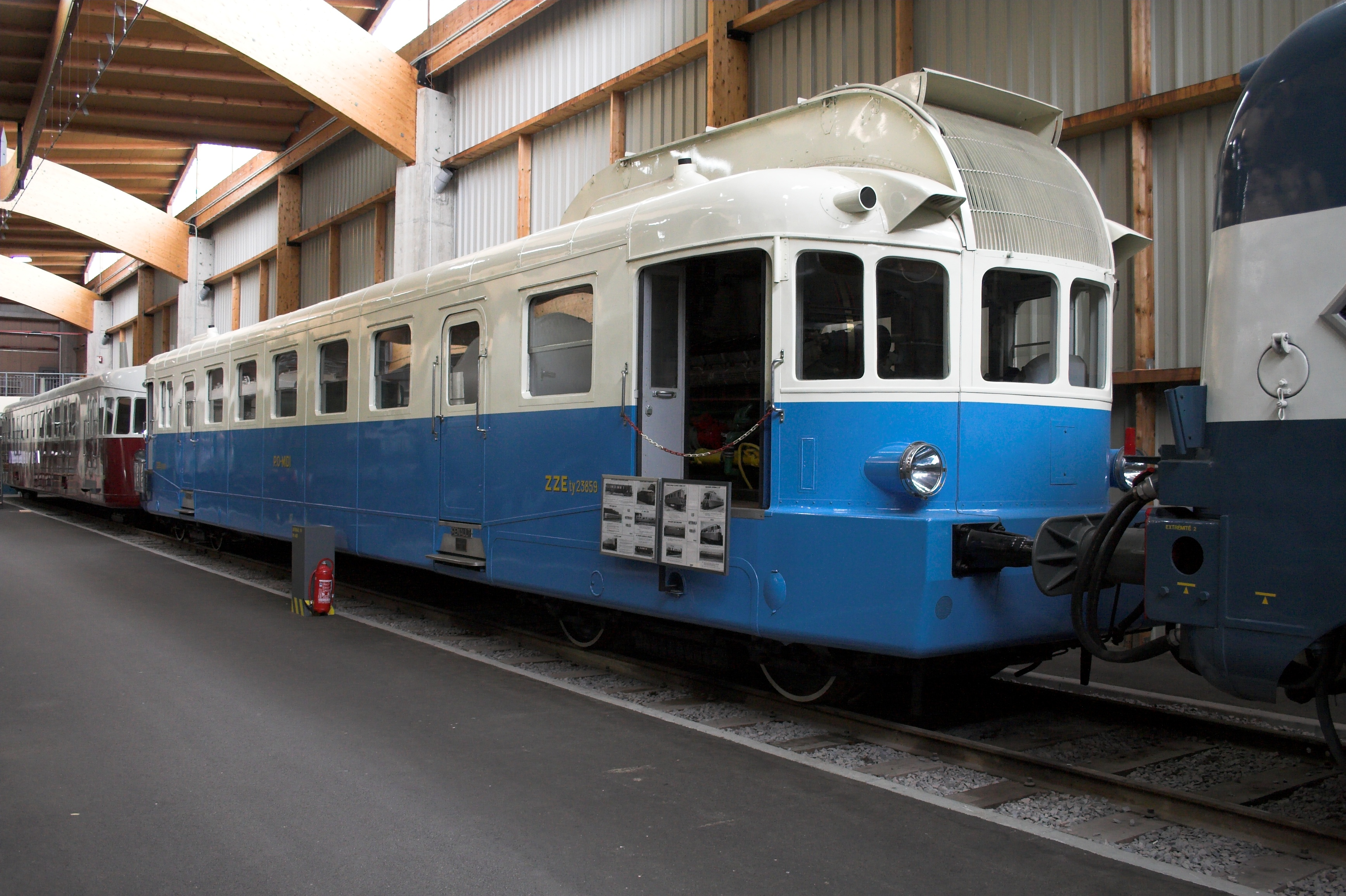 an autorail Renault VH2211 at Cité du Train de Mulhouse(Mulhouse, France)